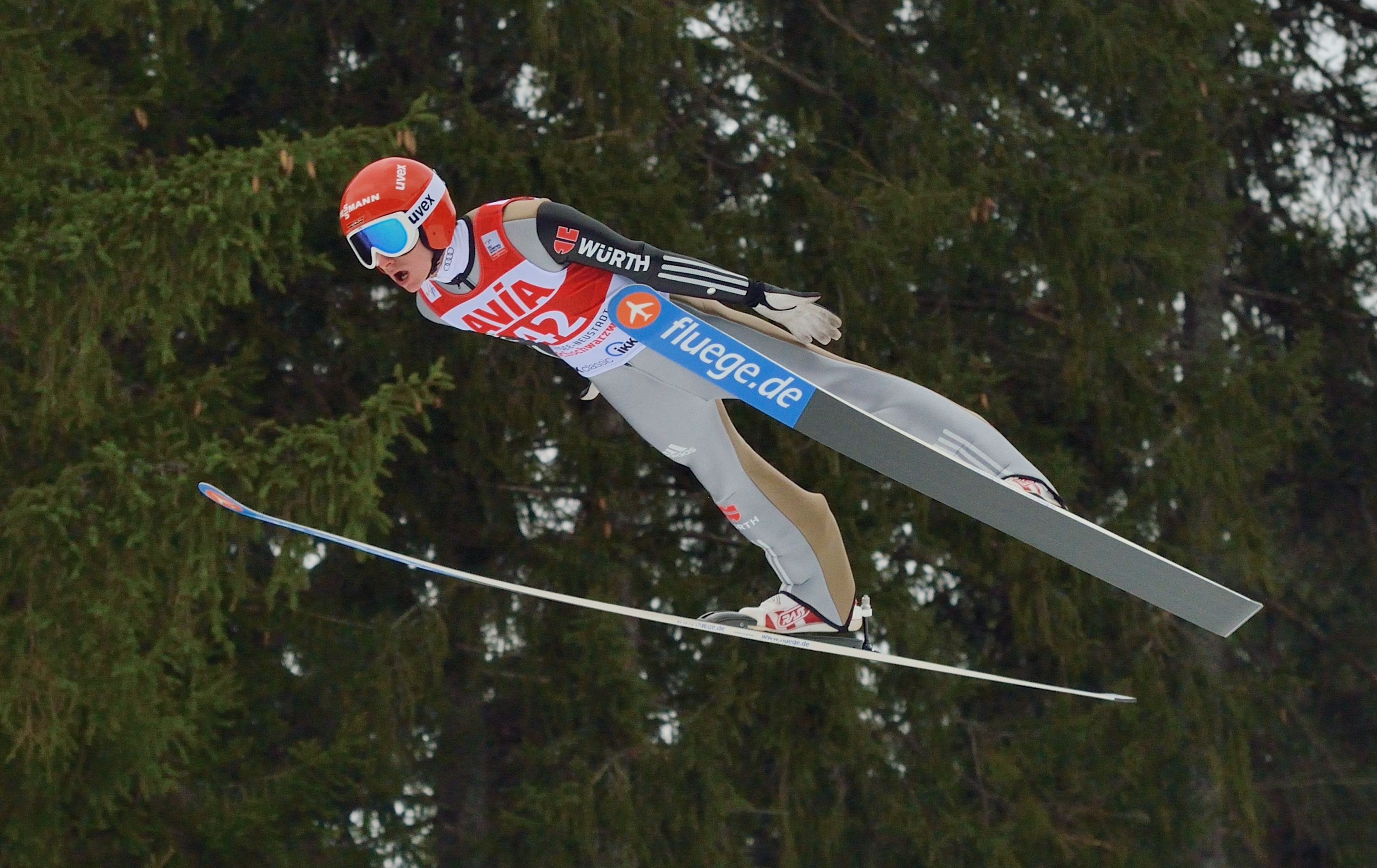 FIS Ski Weltcup Titisee-Neustadt 2016: Richard Freitag